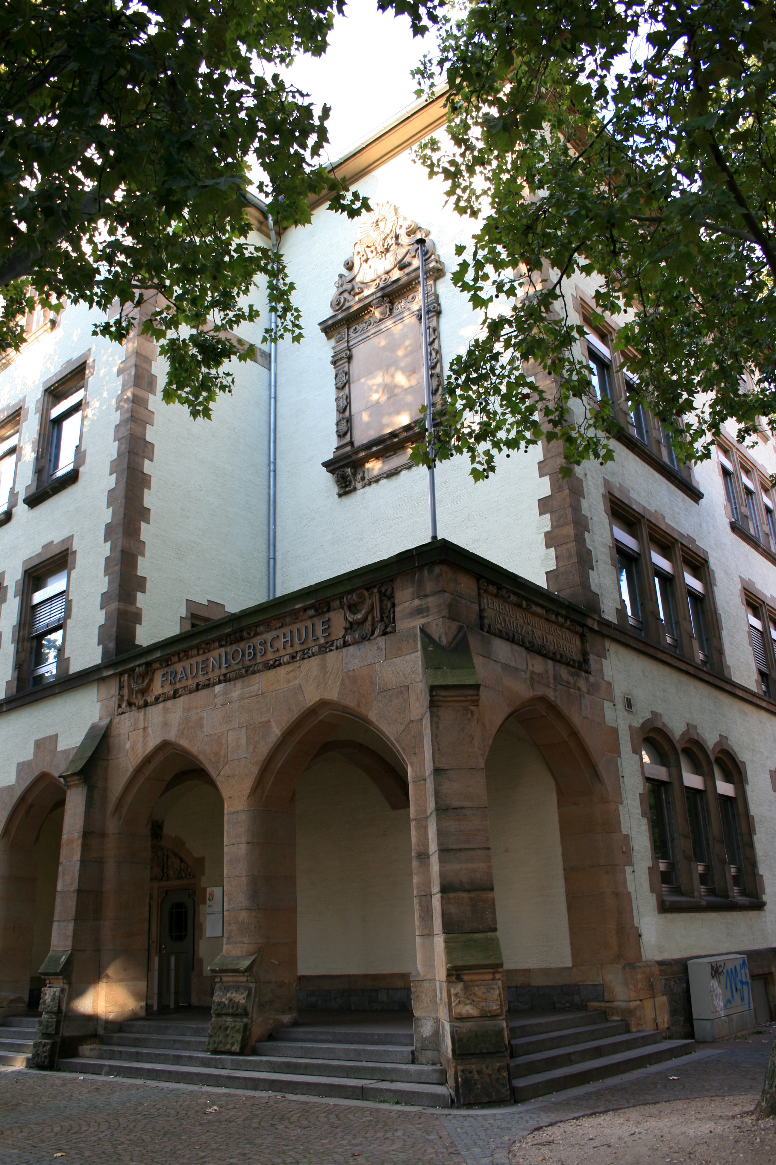 Mainz, Adam-Karrillon-Straße 35: Frauenlobgymnasium; ehemalige Oberreal- und Höhere Handelsschule, mächtiger Eckbau, Giebelrisalit mit Laube, Neurenaissance, 1904–06, Architekt Adolf Gelius